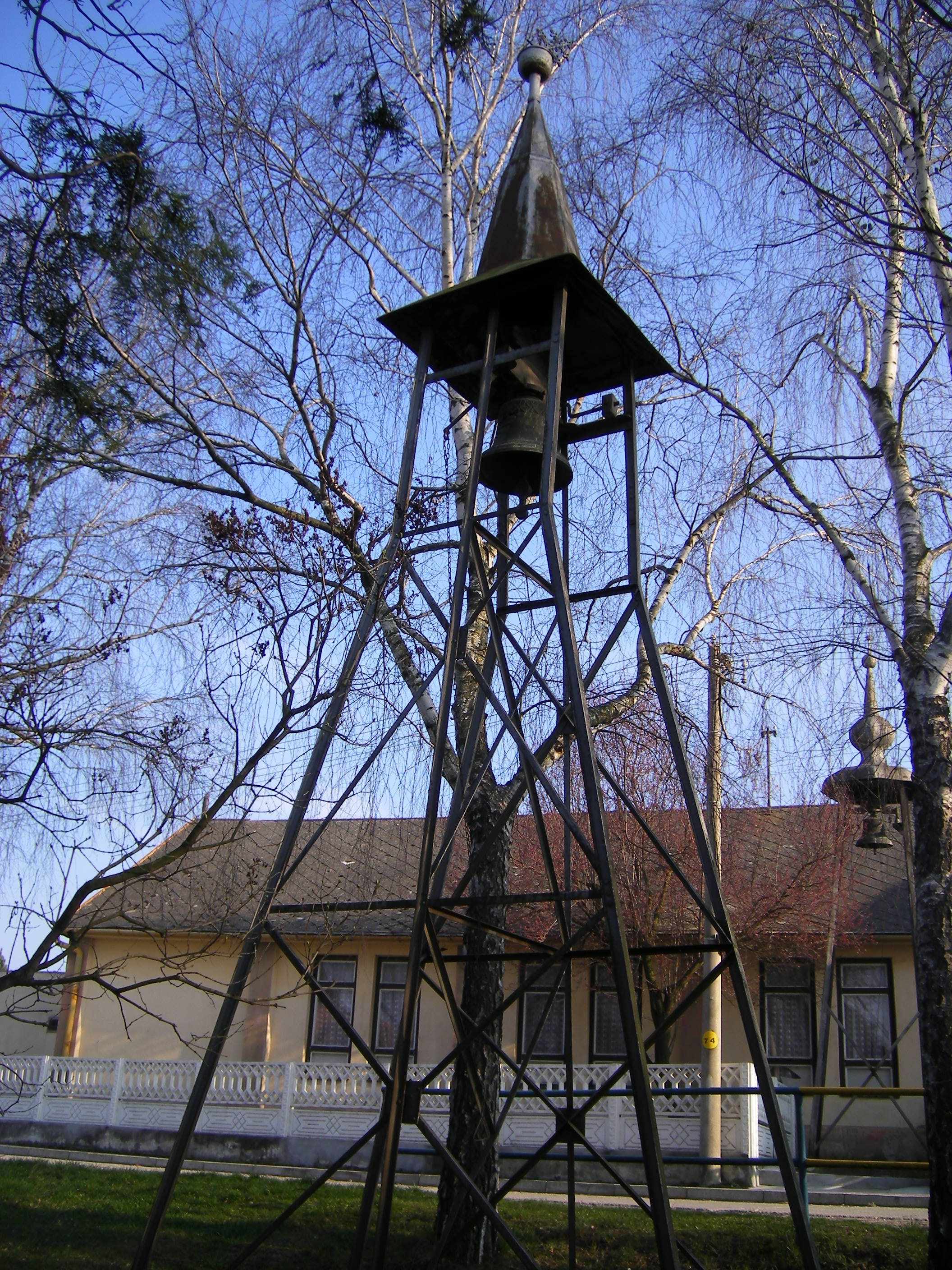 A bogyai katolikus harangláb.